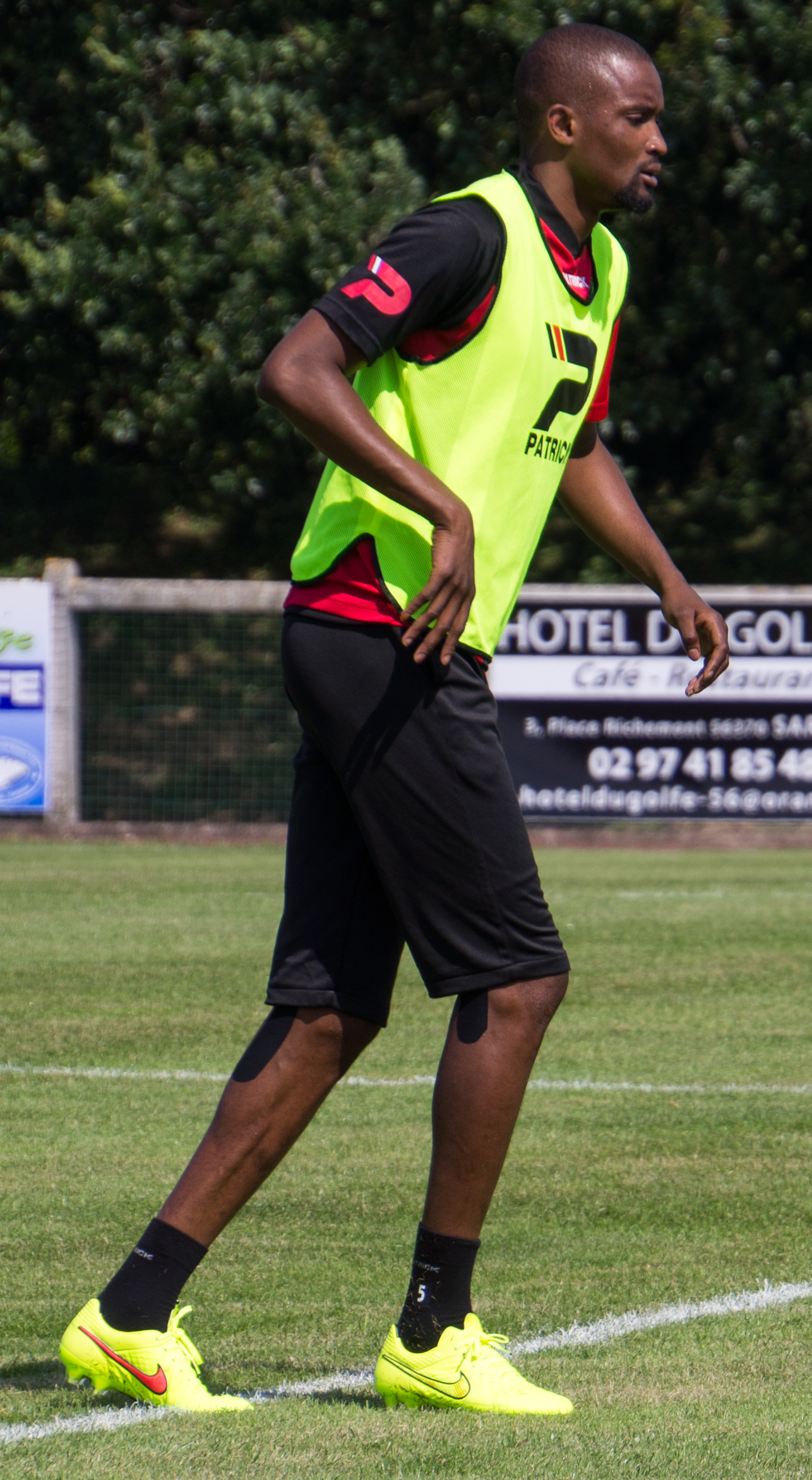 Mustapha Diallo à l'entrainement le 11 juillet 2014